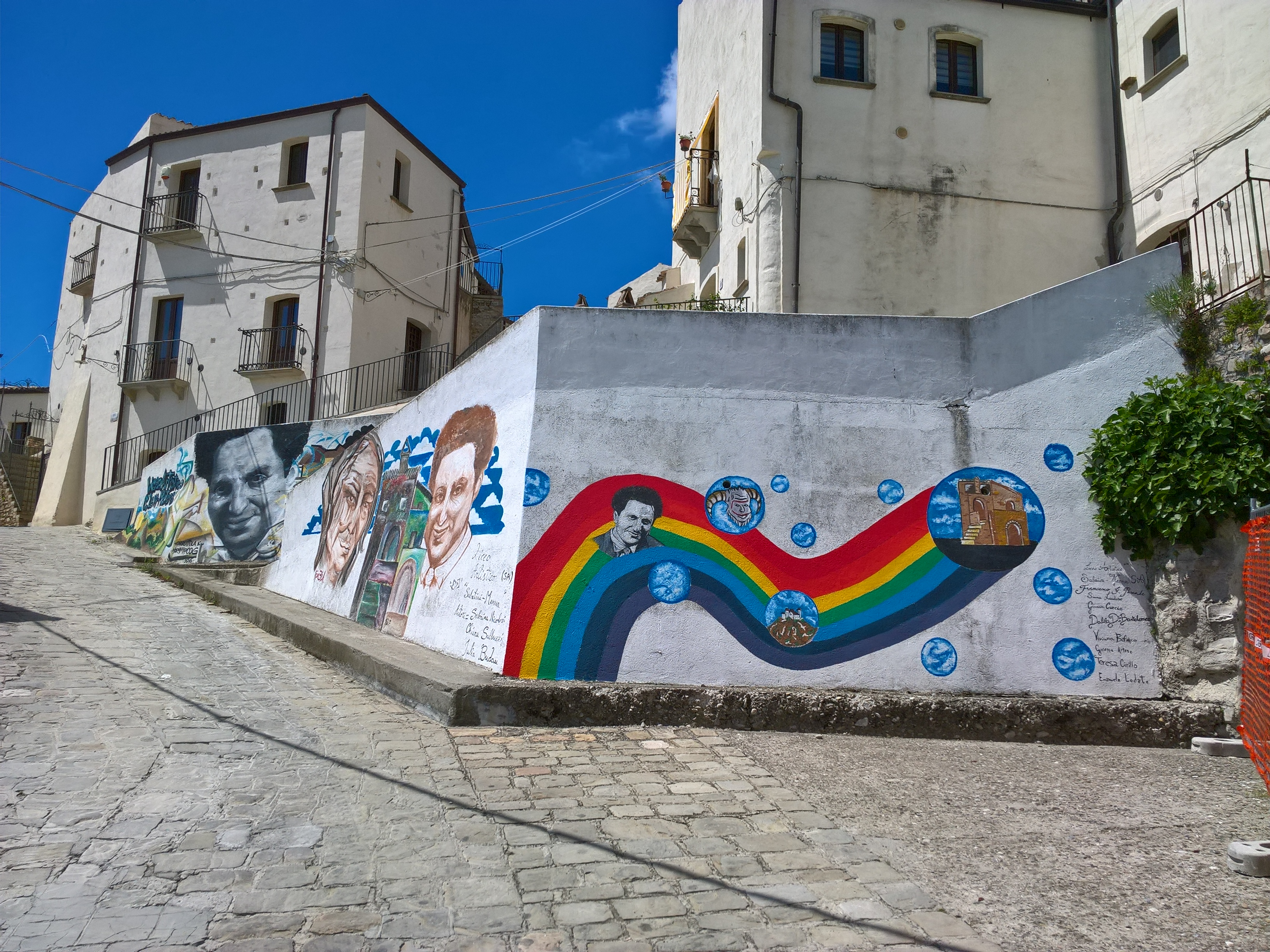 Via Cisterna